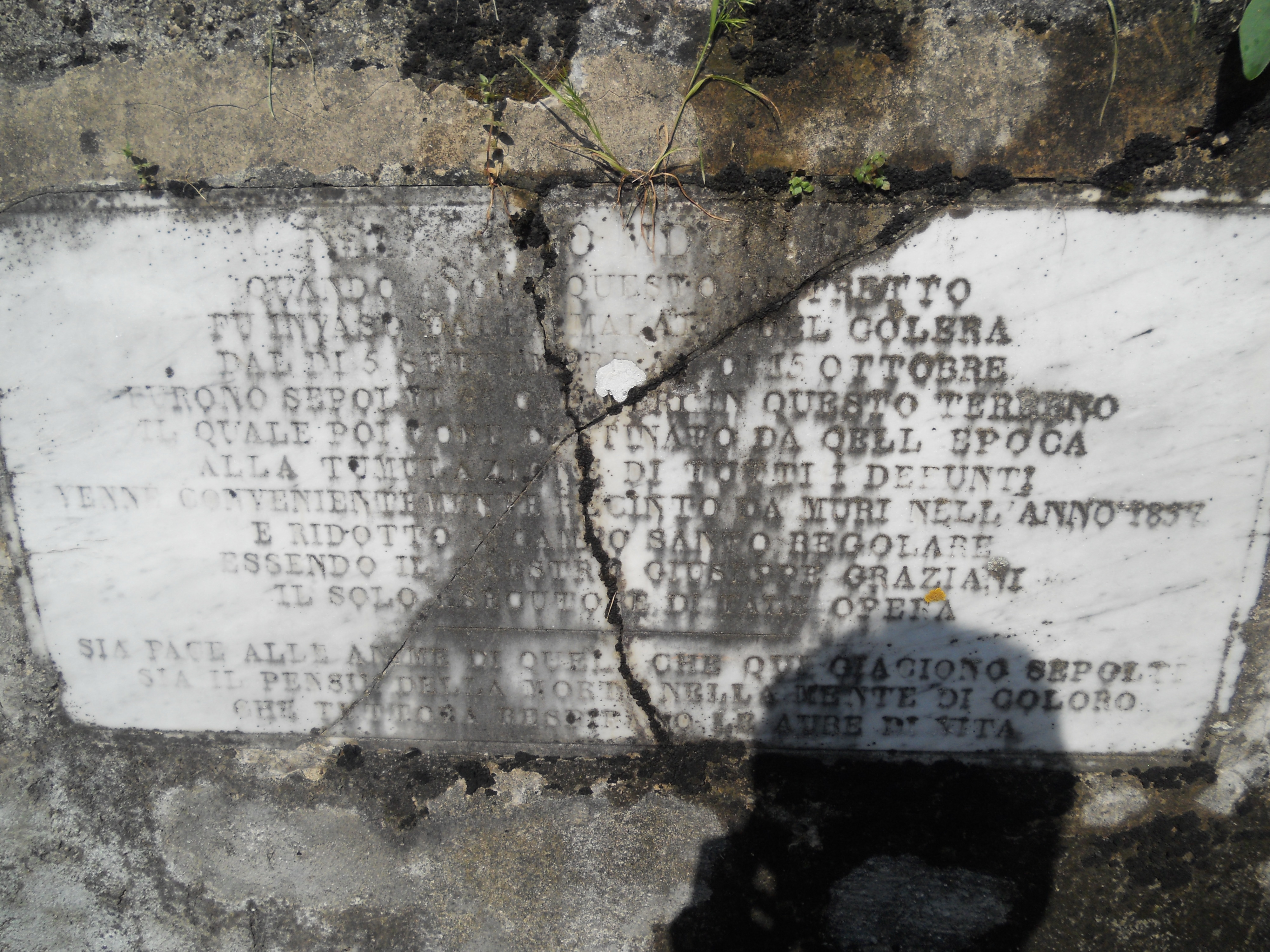 Il colera colpì Retignano nel 1857